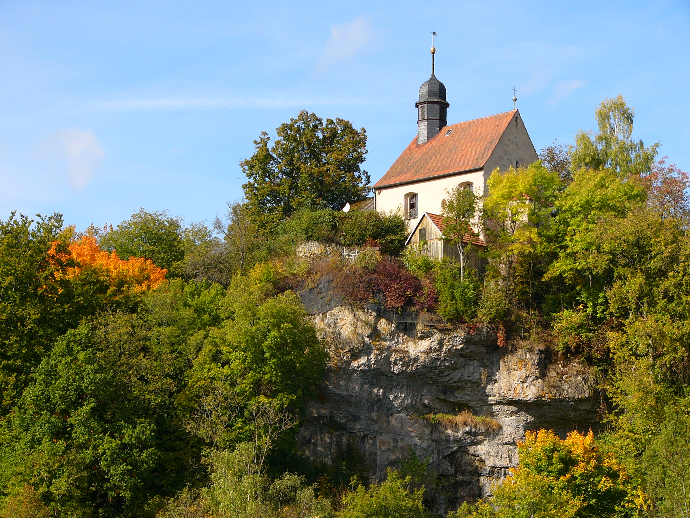 Evangelische Filialkirche im HerbstThis is a photograph of an architectural monument.